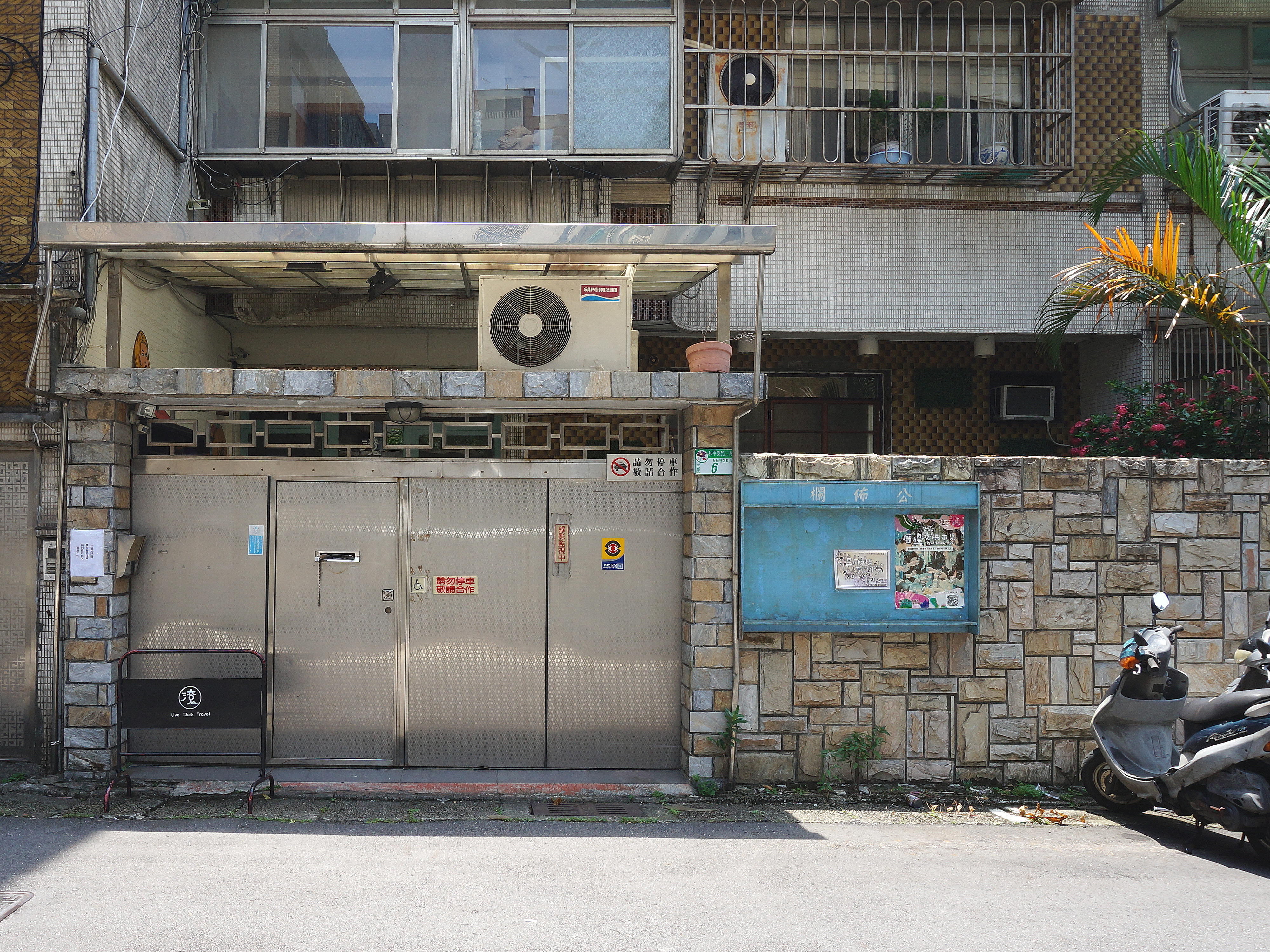 滾出趣人生旅所，地址：臺北市大安區和平東路二段96巷20弄6號1樓。